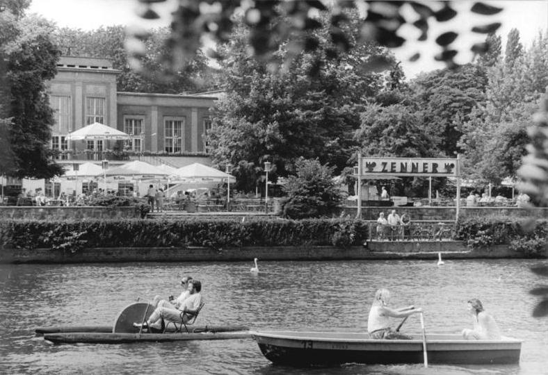 Berlin, Treptow, Gaststätte "Zenner" ADN-Schindler -2.7.1990-Berlin Blick vom Westen auf die traditionsreiche Ausflugsgaststätte "Zenner" im Ostberliner Stadbezirk Treptow.